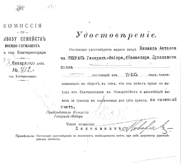 Эвакуационное удостоверение семьи полковника Михаила Жебрак (sic) (1875-1918), Екатеринодар, 1920 год